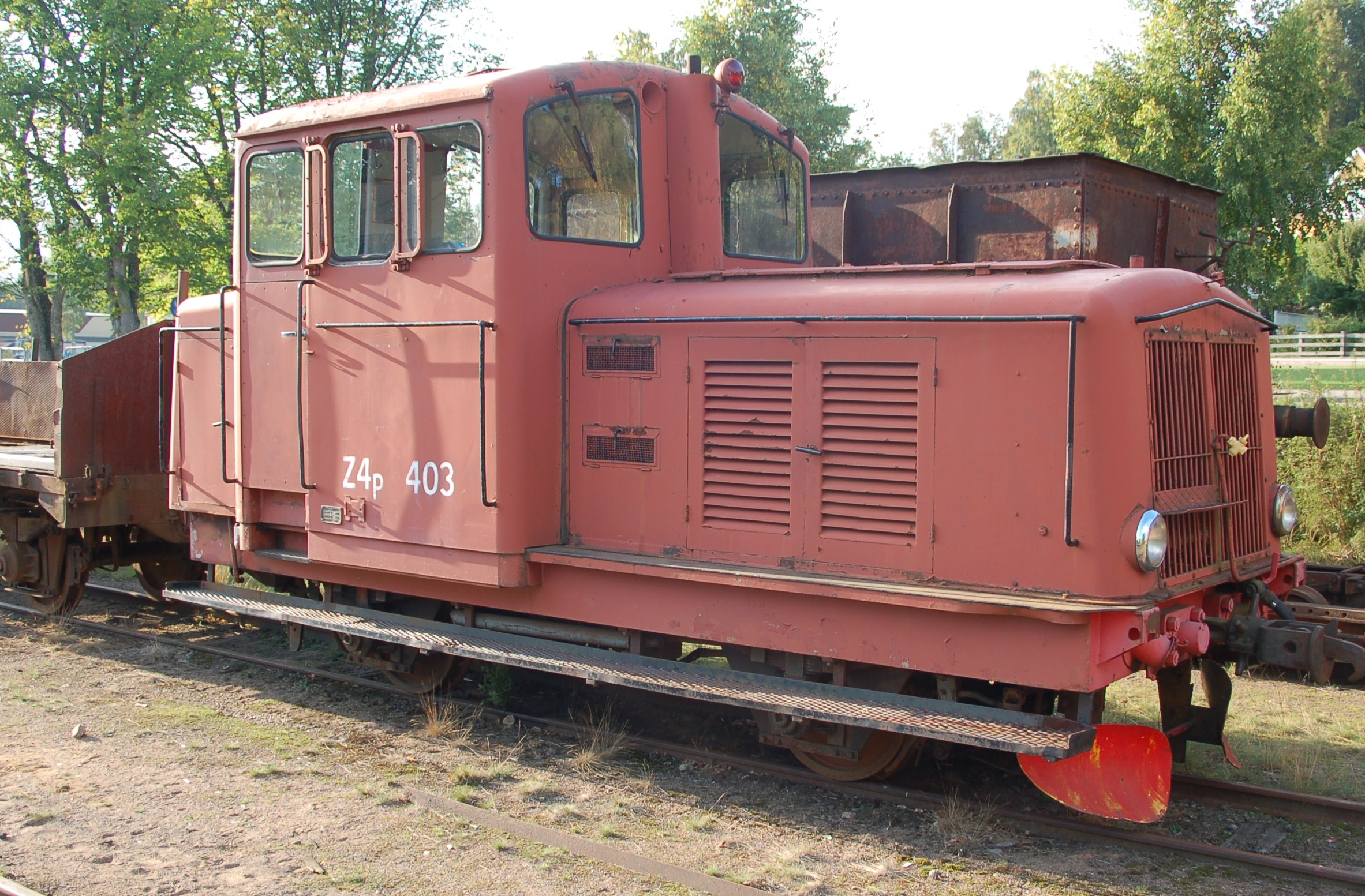 f.d. SJ Z4p 403 i Virserum